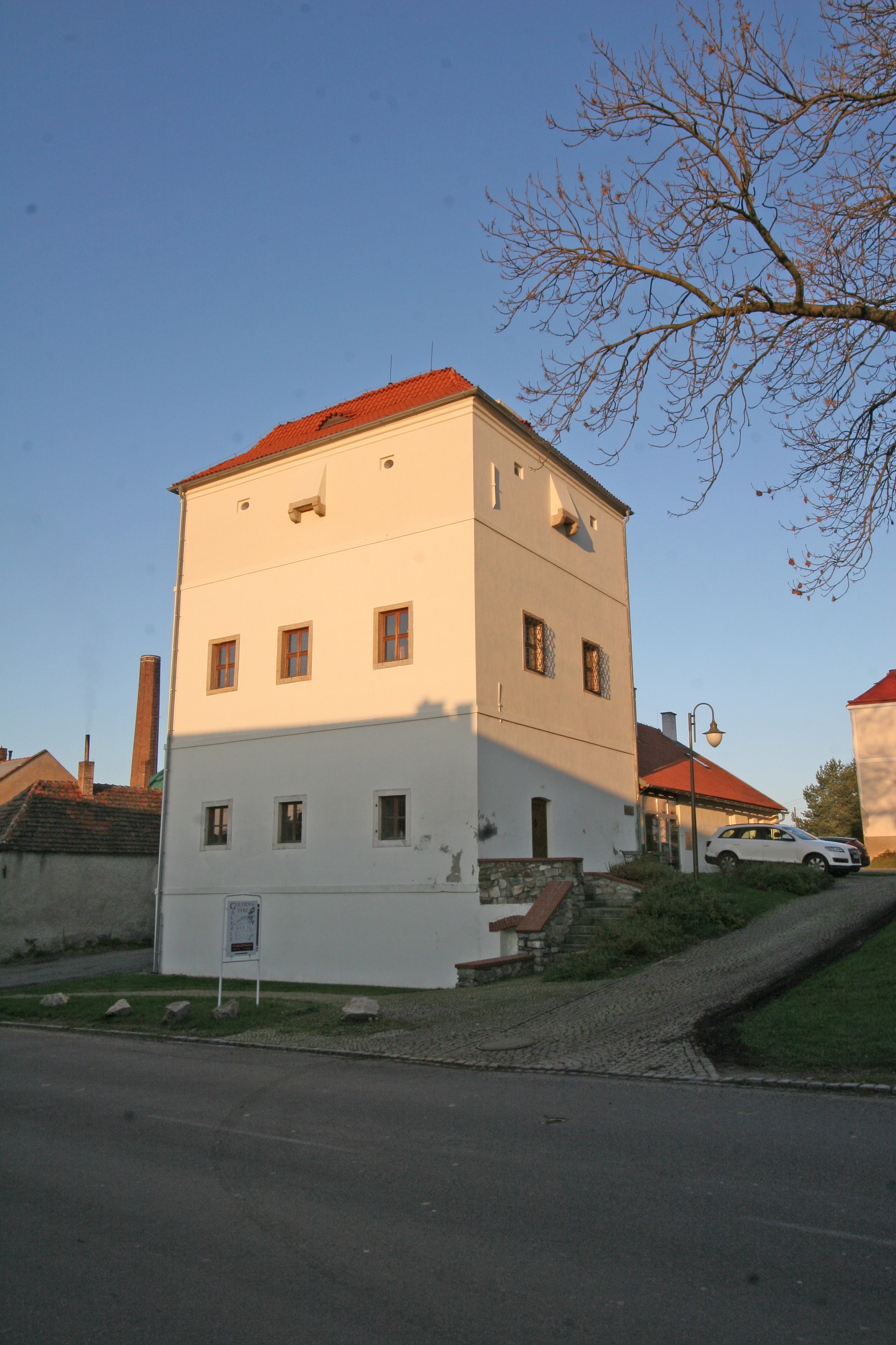 Tvrz (Golčův Jeníkov), 5. května 8, Golčův Jeníkov